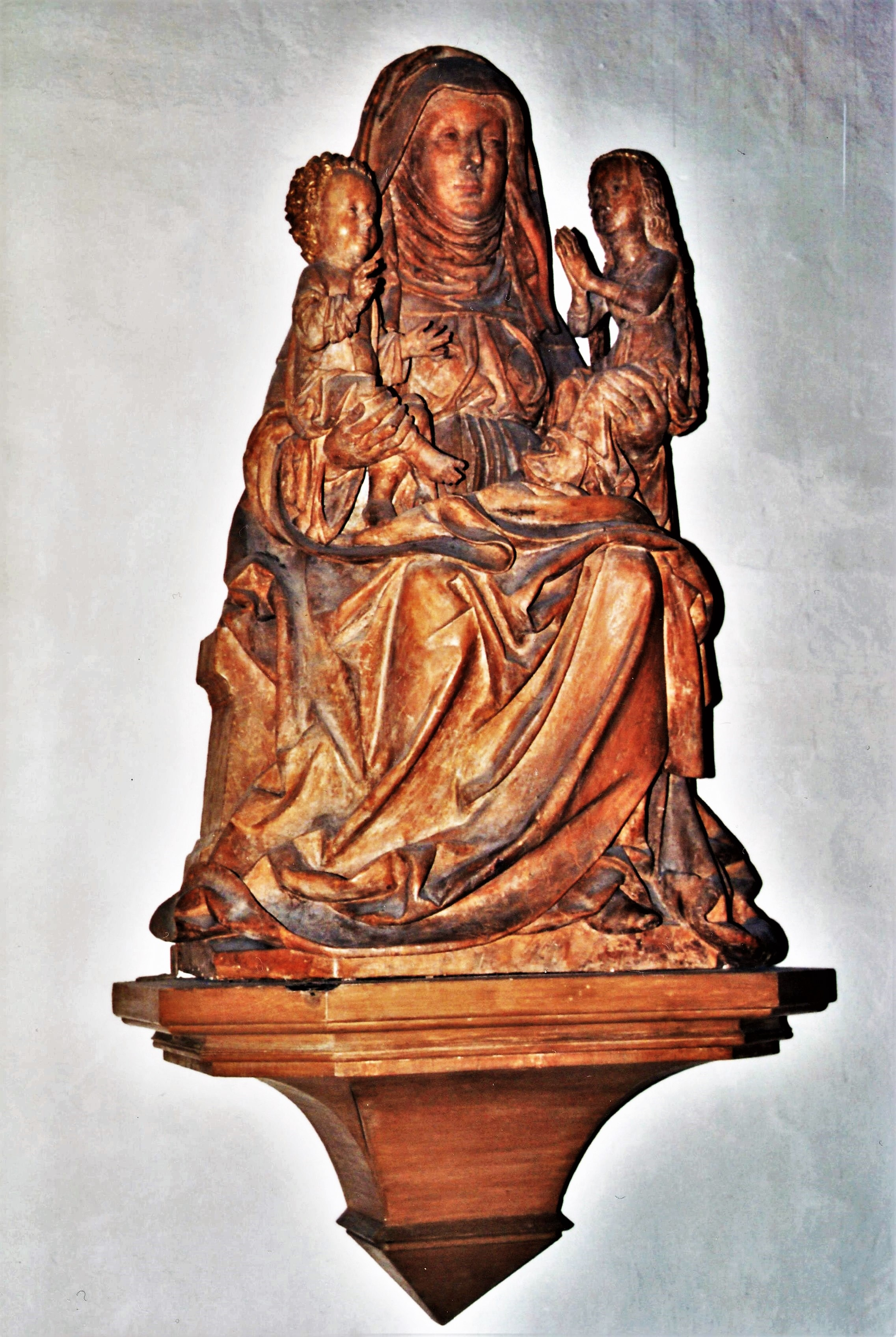 Kitzingen, Kirche St. Johannes: Spätgotische Figur St. Anna Selbdritt (um 1500)